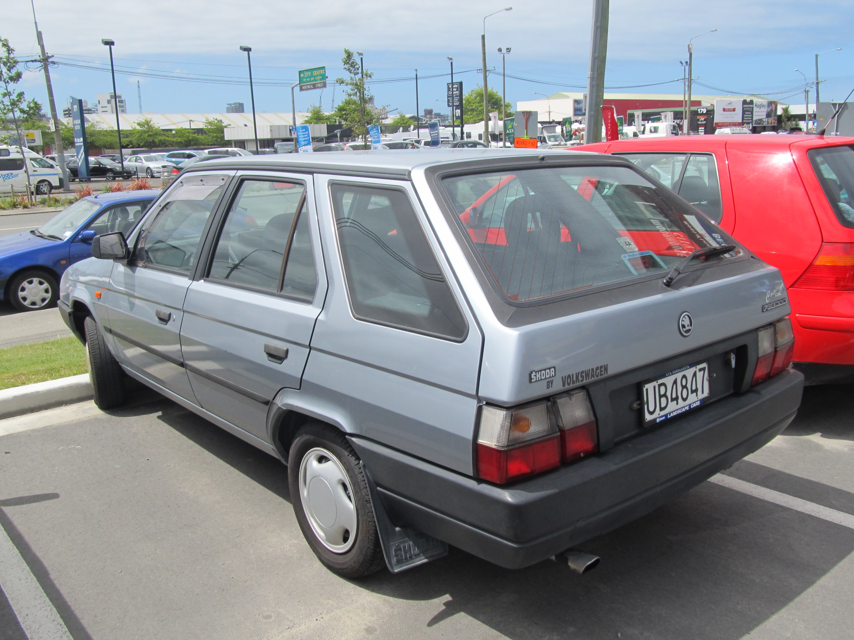 1996 Skoda Favorit Forman GLX Estate